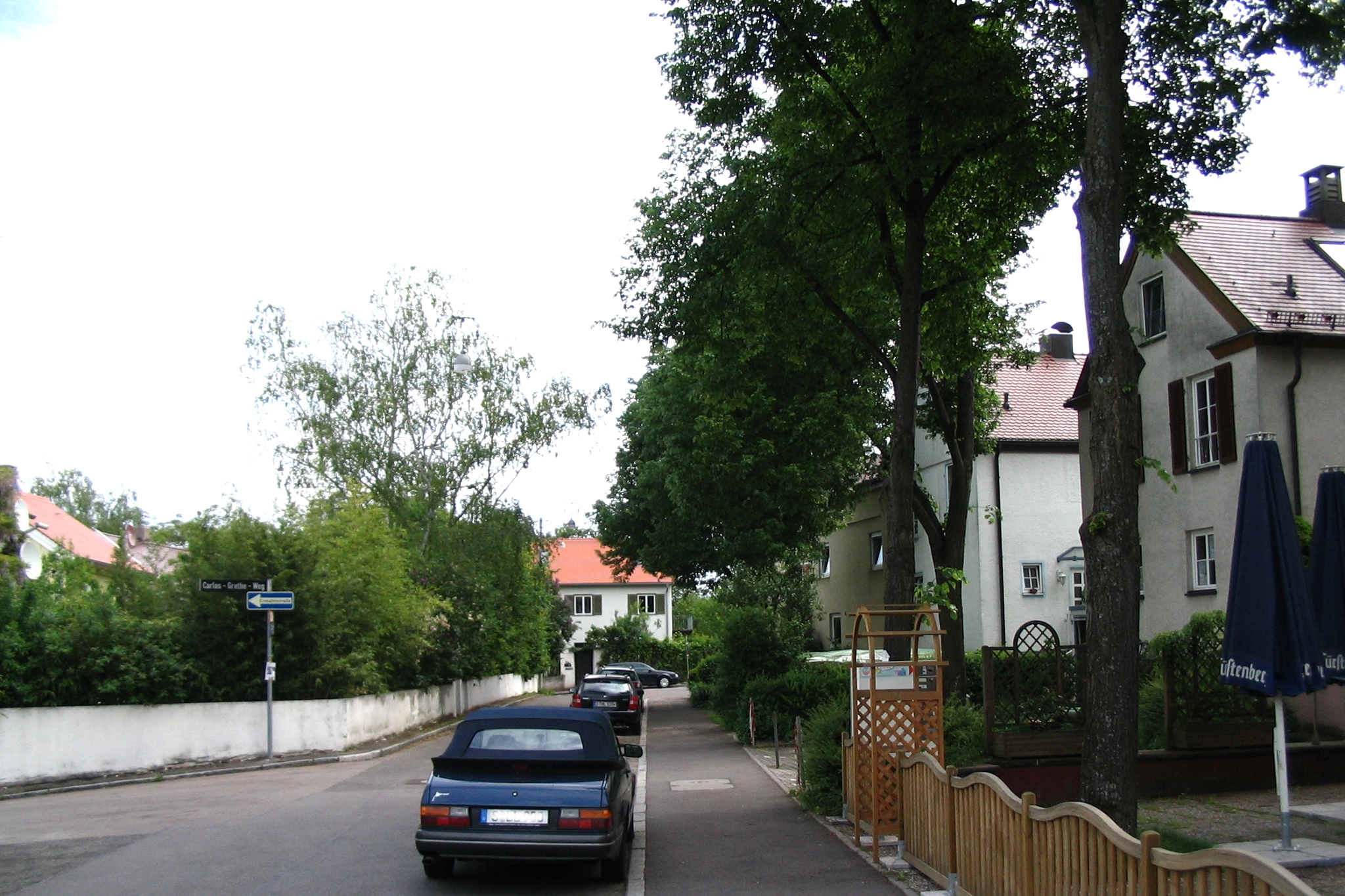 Kochenhofsiedlung in Stuttgart, Hermann-Pleuer-Straße, 2006